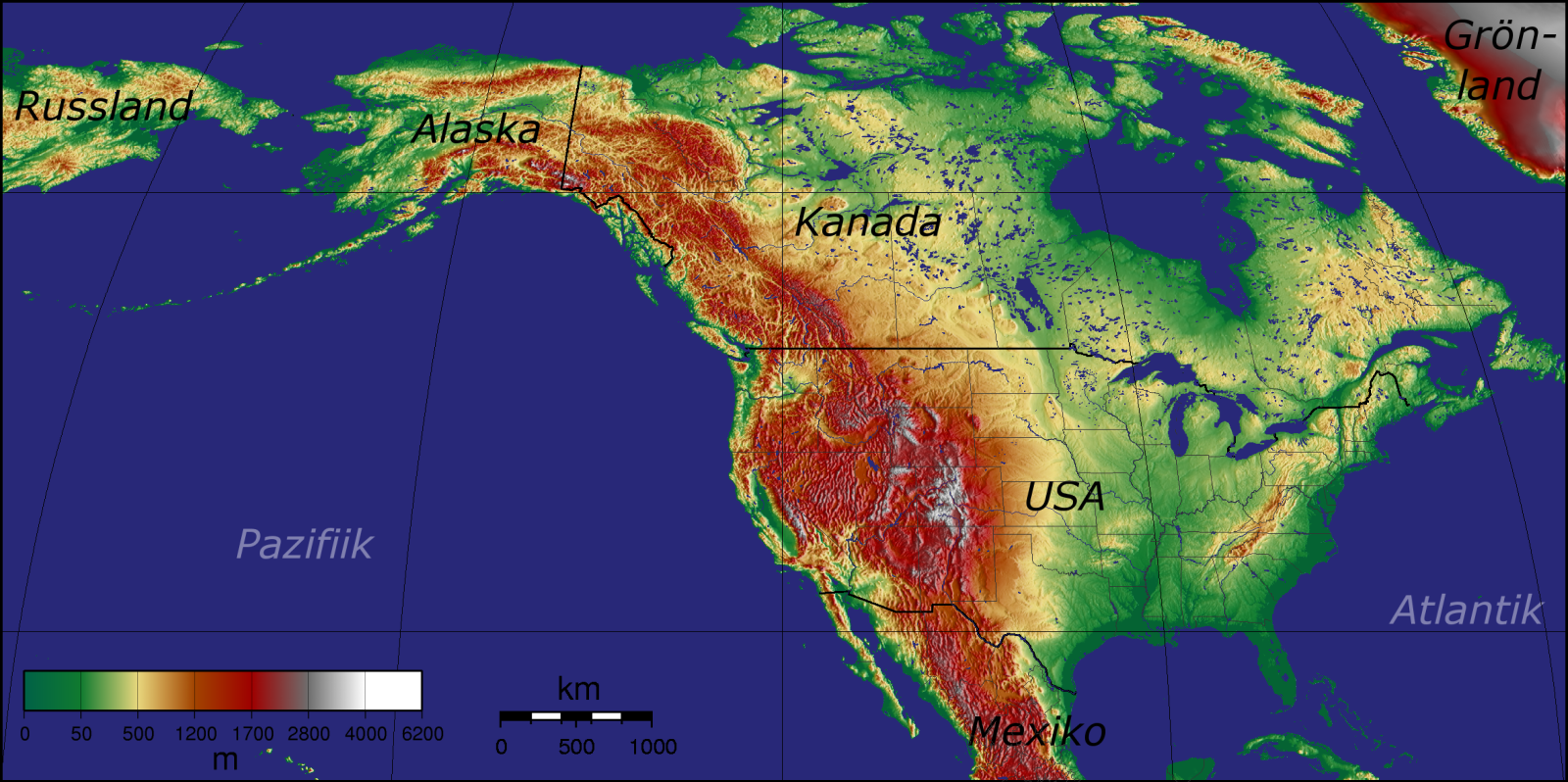 Bei der Erstellung der Landkarte wurden die Generic Mapping Tools verwendet: Für das Relief - falls vorhanden - wurde(n) einer oder mehrere dieser externen Public Domain-Datensätze verwendet: ETOPO2 (Auflösung 2′ = 3,6km am Äquator) GLOBE (30″ = 0,9km) SRTM (Shuttle Radar Topography Mission) (3″ = 90m) Wichtiger Hinweis: Vor dem Verschieben von Landkarten mit deutscher Beschriftung nach Commons bitte folgenden Hinweis beachten: Maps and diagrams can be uploaded in any language, but a "blank" version of such files (without any comments, but rather numbers or letters) is preferred. [...] you may of course upload both a commented and an uncommented version, other users will use the uncommented version to translate it into their own language. Also vor dem Verschieben der deutschen Version bitte an den Autor der Karte wenden mit der Bitte um eine unbeschriftete Version!